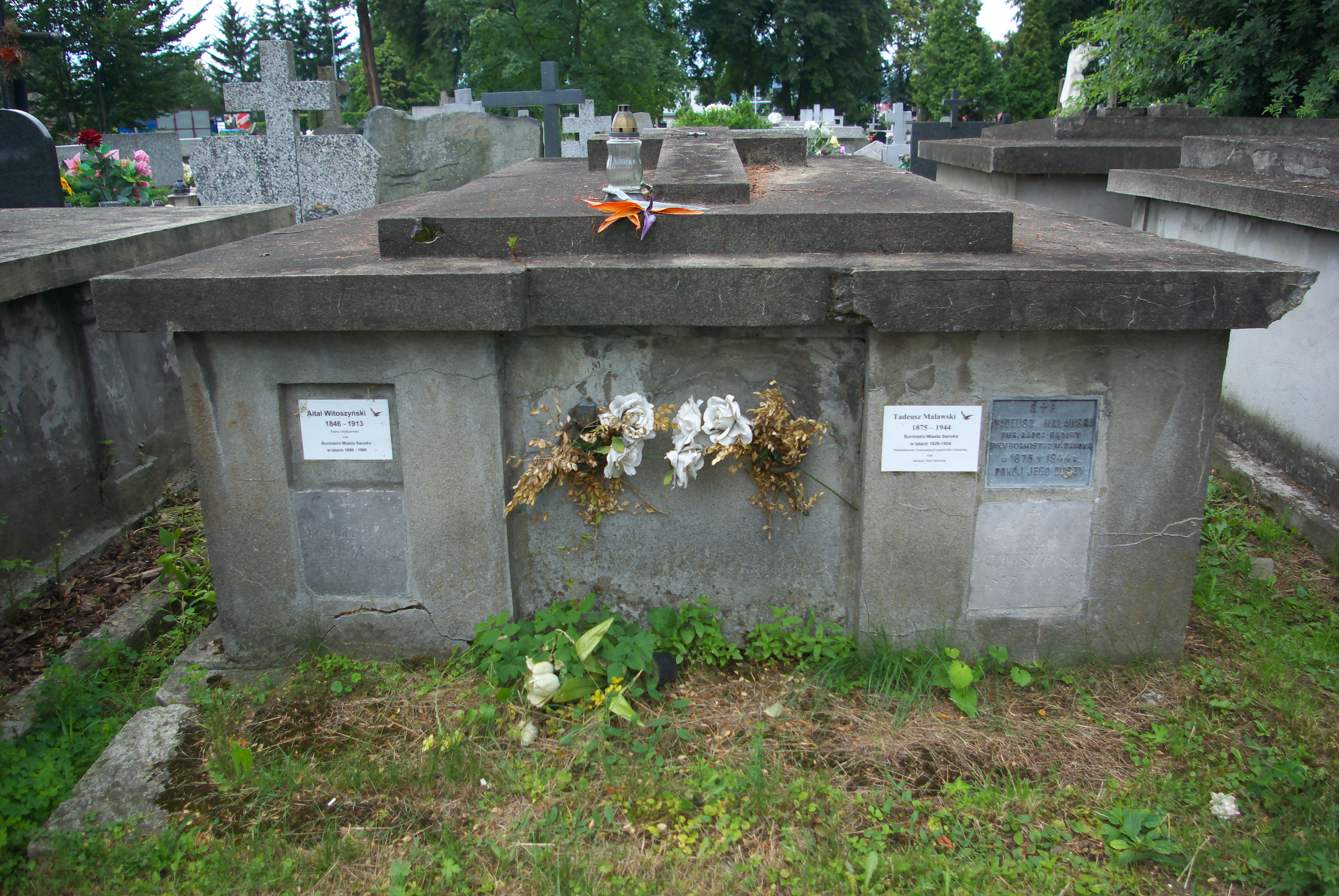 Grobowiec Aitala Witoszyńskiego i Tadeusza Malawskiego na Cmentarzu Centralnym w Sanoku